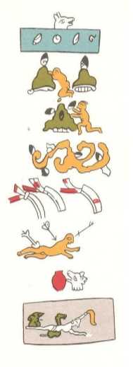 Nueve infiernos descritos en el Códice Vaticano A